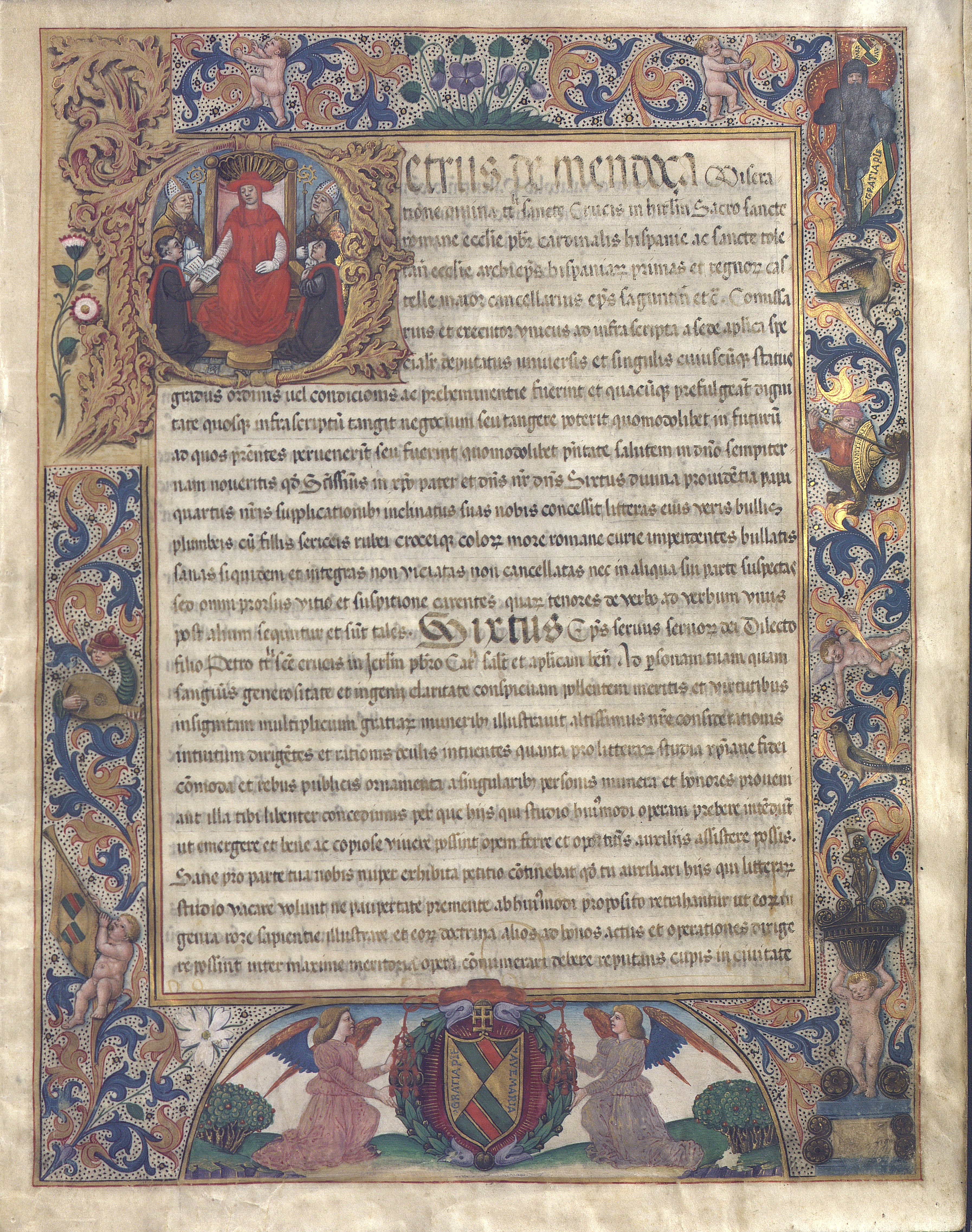 Documento expedido por don Pedro González de Mendoza por el que instituye el Colegio de Santa Cruz.